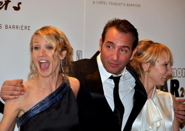 Alexandra Lamy, Jean Dujardin et Audrey Lamy à la cérémonie des César